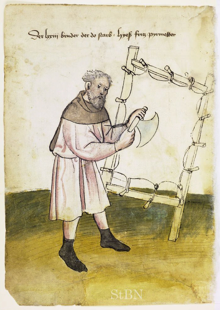 fritz (Fritz) pyrmetter (Pyrmetter; Permeter; Pergamenter) , pyrmetter (Pergamentmacher) Transkription und weitere Informationen